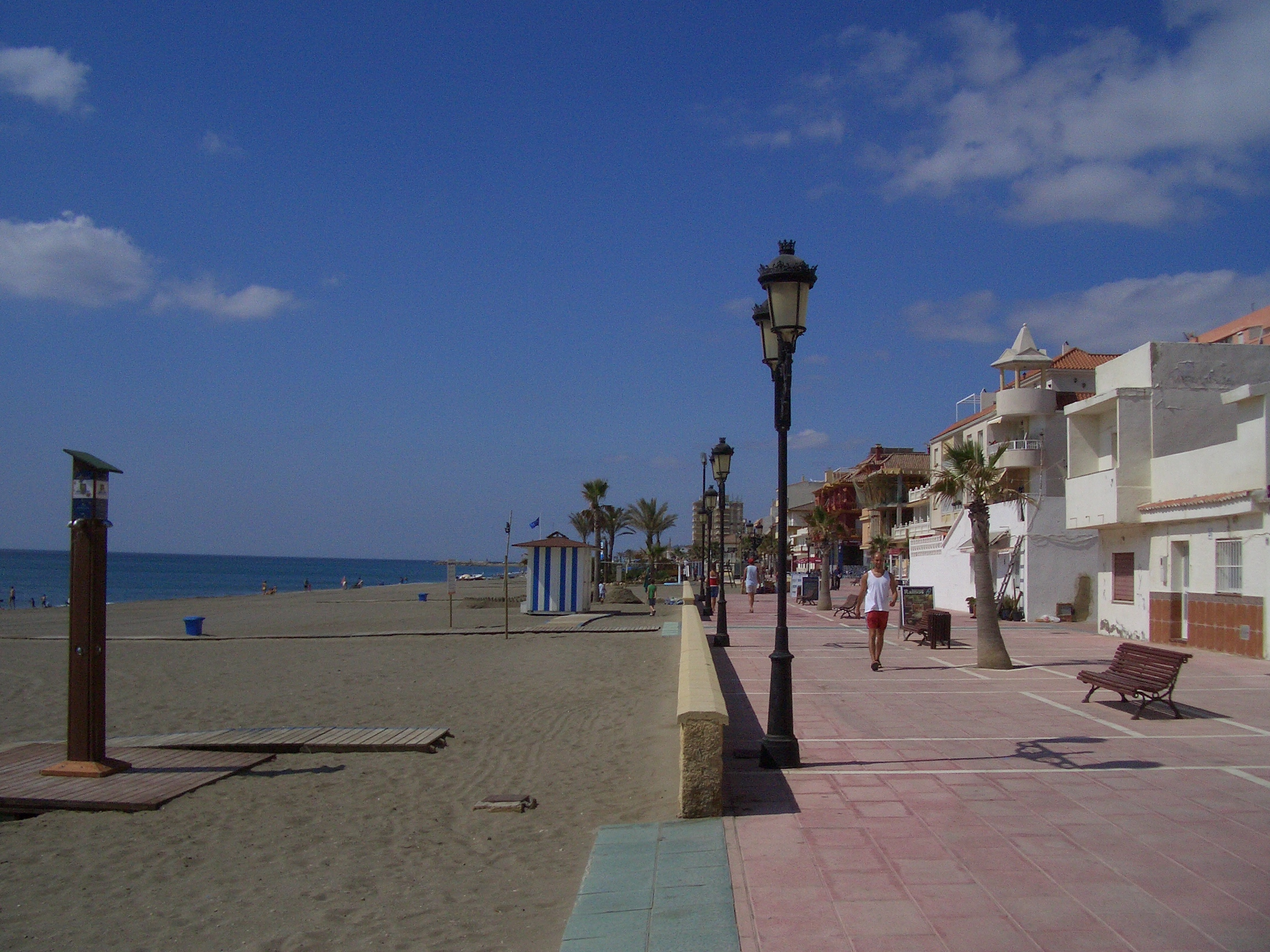 Paseo marítimo de San Luis de Sabinillas, Manilva, Málaga, España.